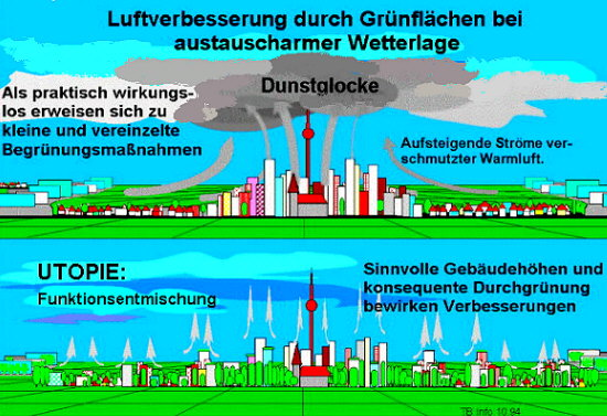 Bauwerksbegrünung als Beitrag zur lokalen Klimaverbesserung